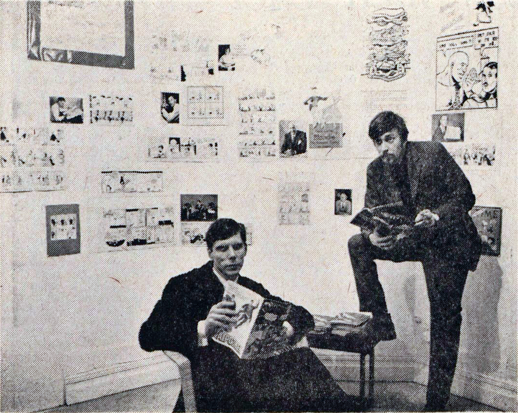 Bildtext i Svenska Dagbladet 1965-12-11 (s. 9): "Seriehistorikern Sture Hegerfors och galleriägaren Bo Karlsson (stående) studerar serietidningar i Galleri Karlsson, där serieutställningen 'Seriernas fantastiska värld' öppnas på lördagen."